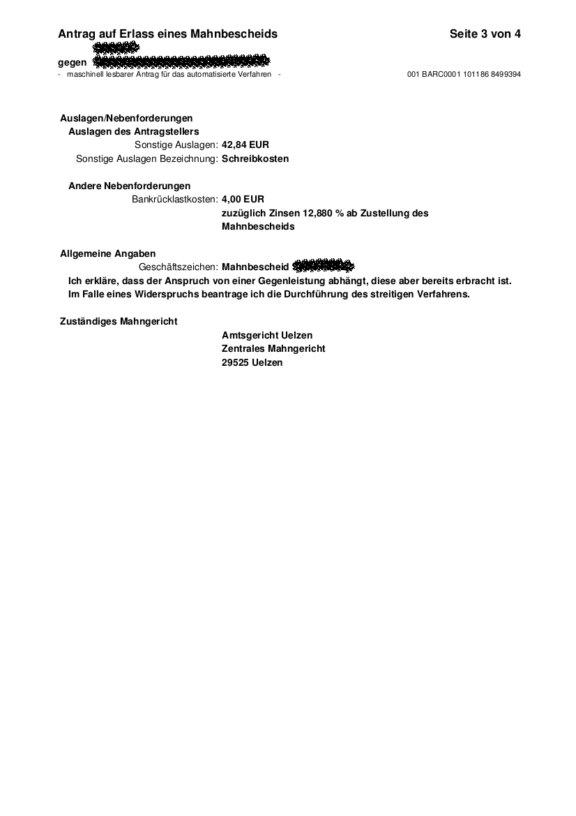 Seite 3 von 4: Antrag auf Erlass eines Mahnbescheids, "Online"-Version, Adressen und einige andere Daten geschwärzt